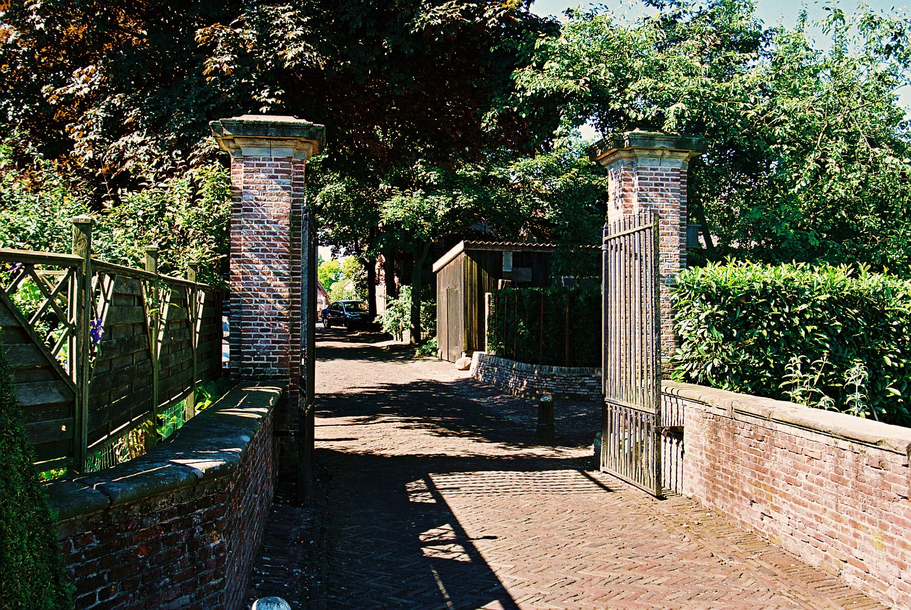 De hekpijlers van het verdwenen Huis te Gramsbergen.